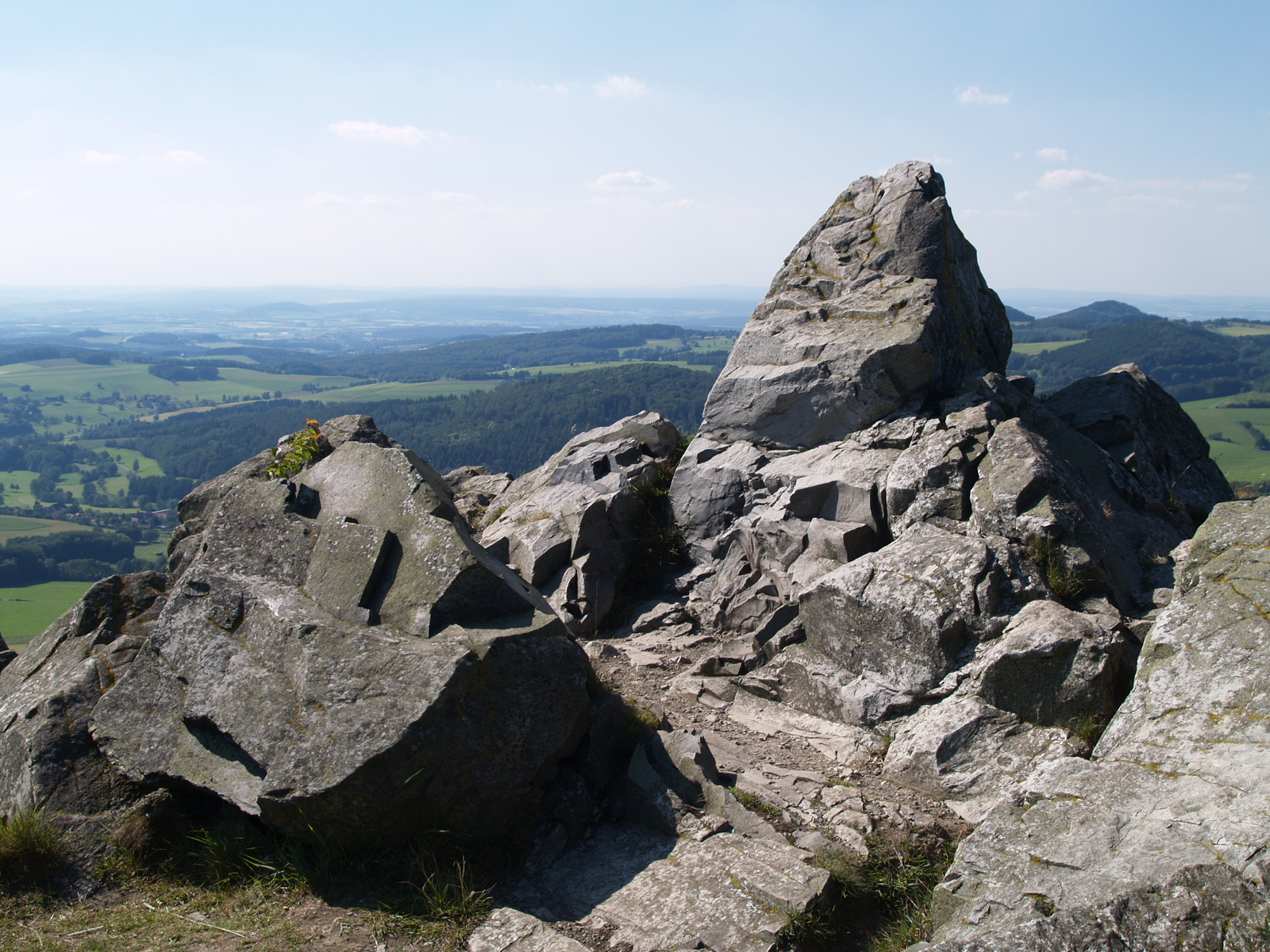 Basaltformationen am Westvorsprung des Pferdskopf in der Rhön